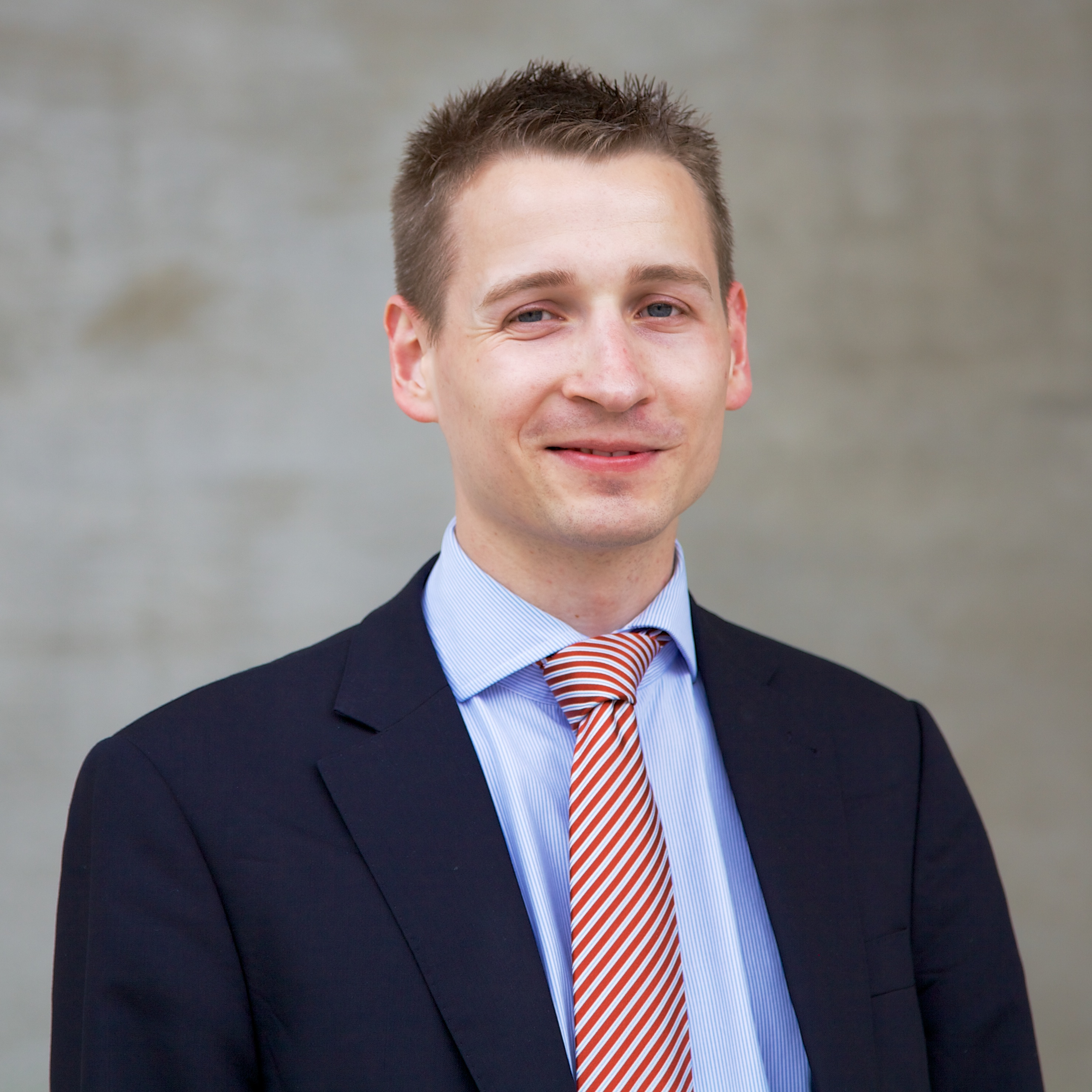 im Mai 2012